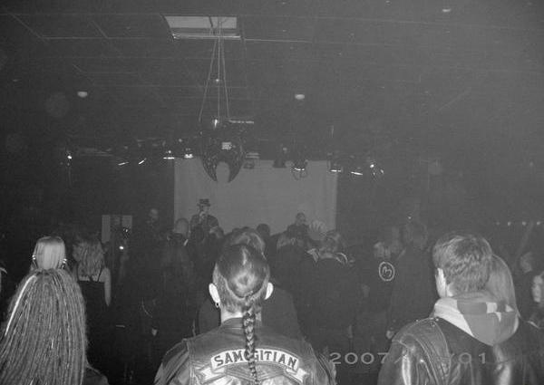 Koncert- Noctivagus - a w "New Style klubie w Vilnius, Republika Litewska